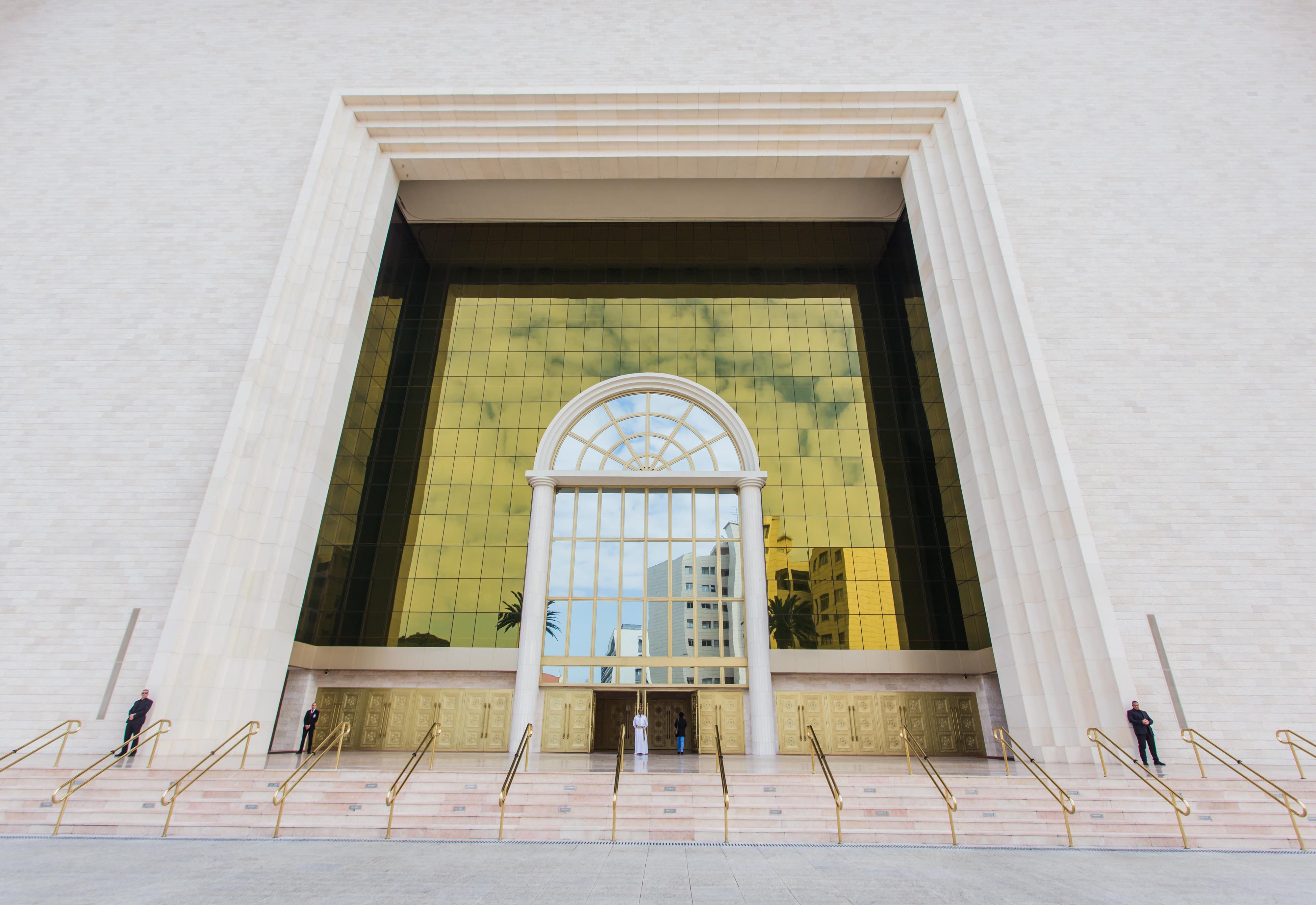 O Governador do Estado de São Paulo Geraldo Alckmin, participou da Solenidade de lançamento do selo Comemorativo dos 40 anos da Universal. Local: São Paulo/SP. Data: 07/07/2017. Foto: Alexandre Carvalho/A2img